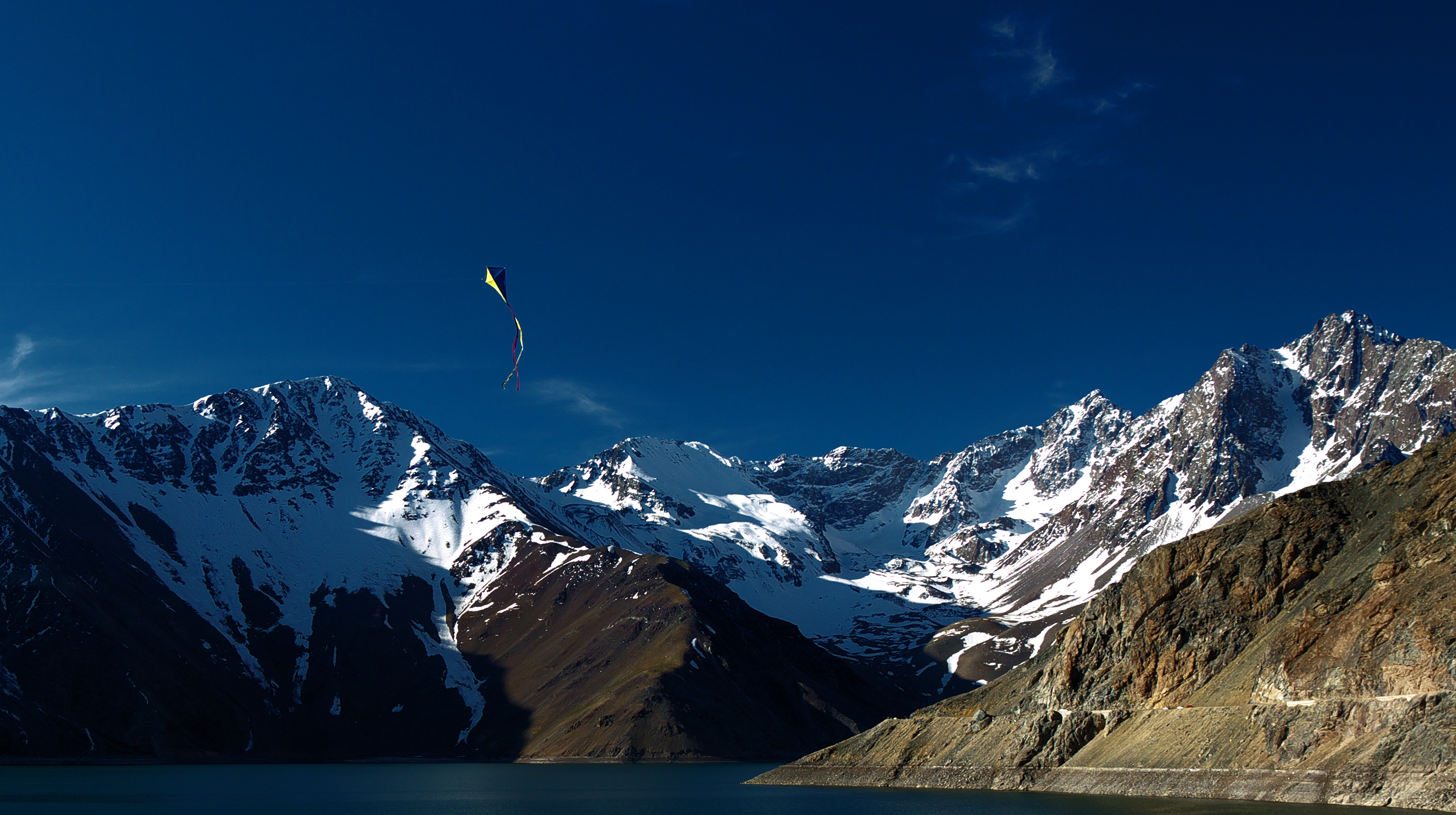 Embalse el Yeso / Cajón del Maipo